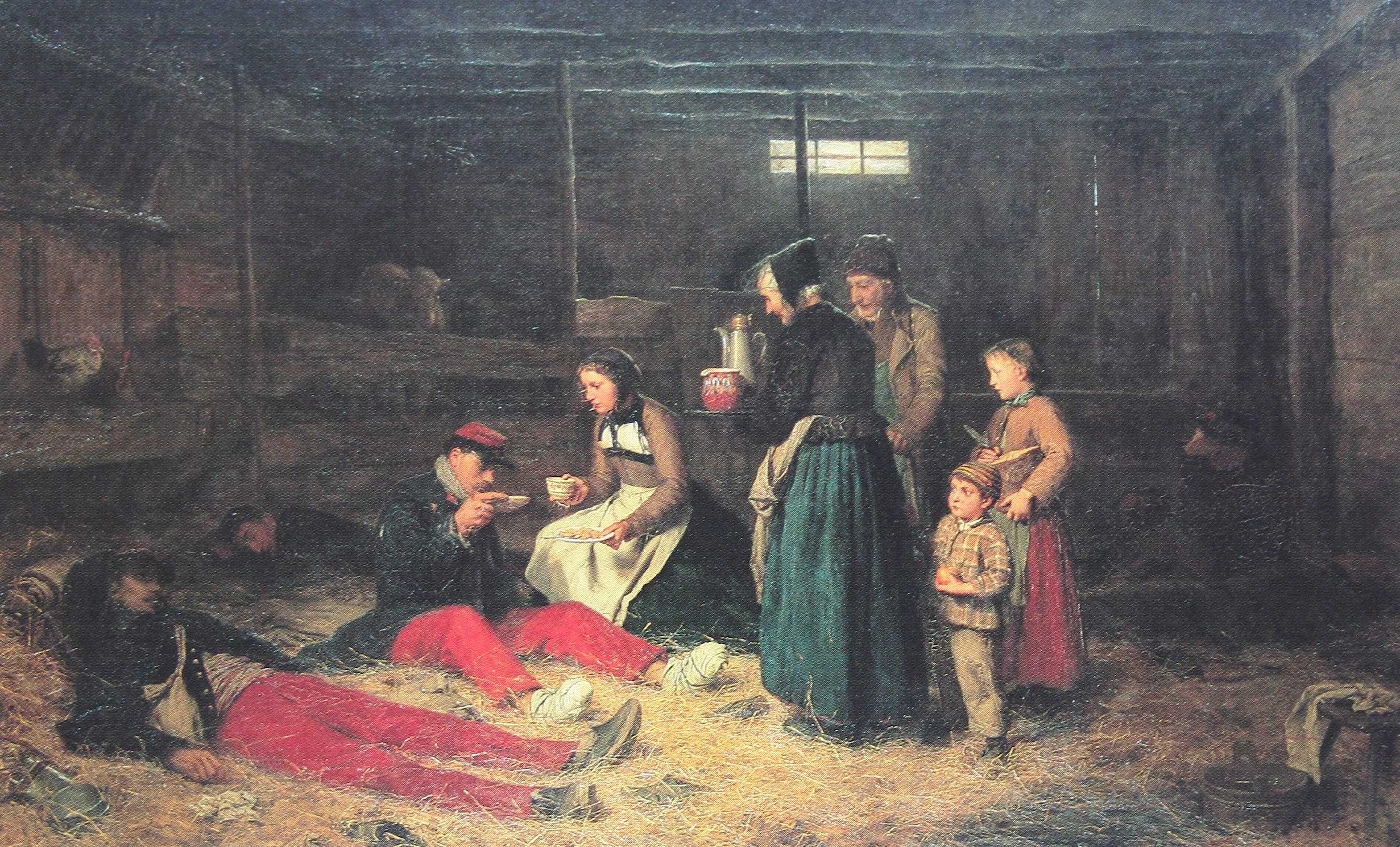 Die Bourbakis, Gemälde von Albert Anker, 1871, 95 x 151 cm, Musée d'art et d'histoires, Neuchâtel